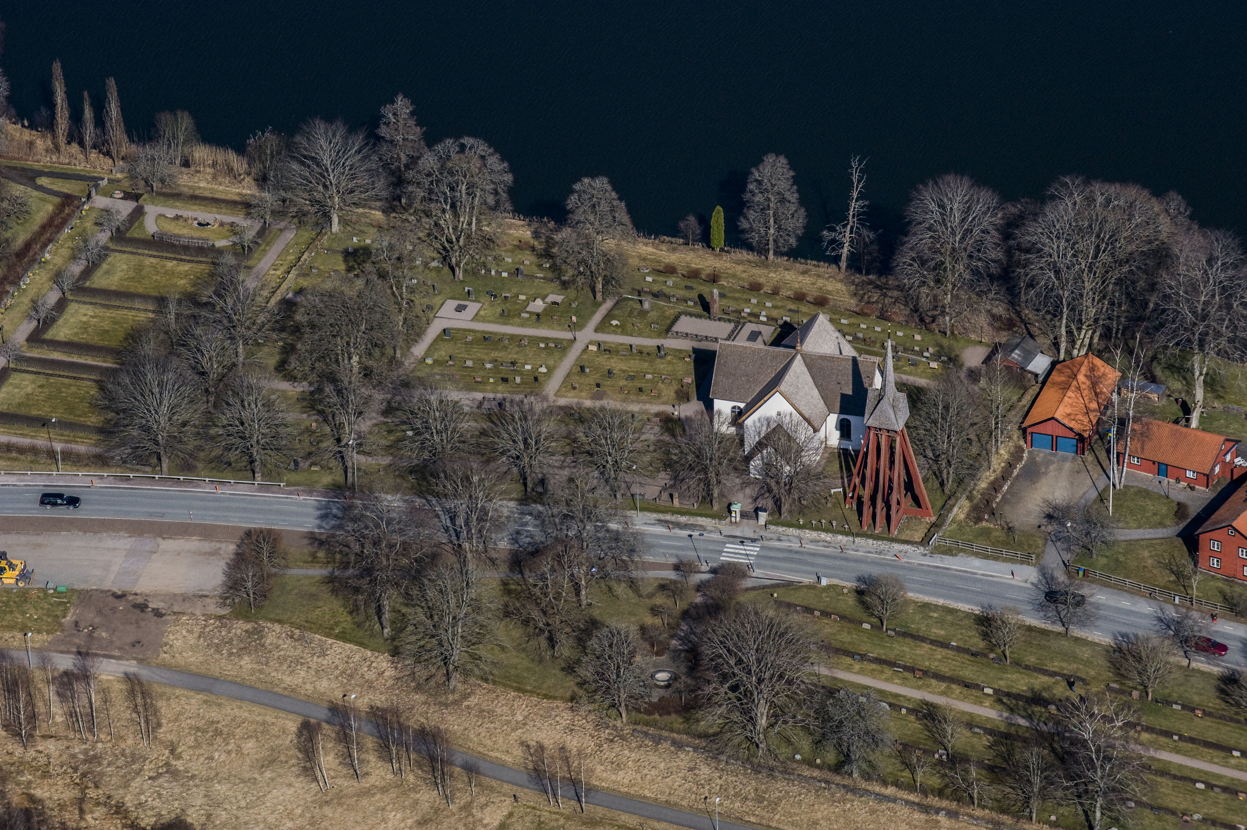 Barnrps kyrka från luften